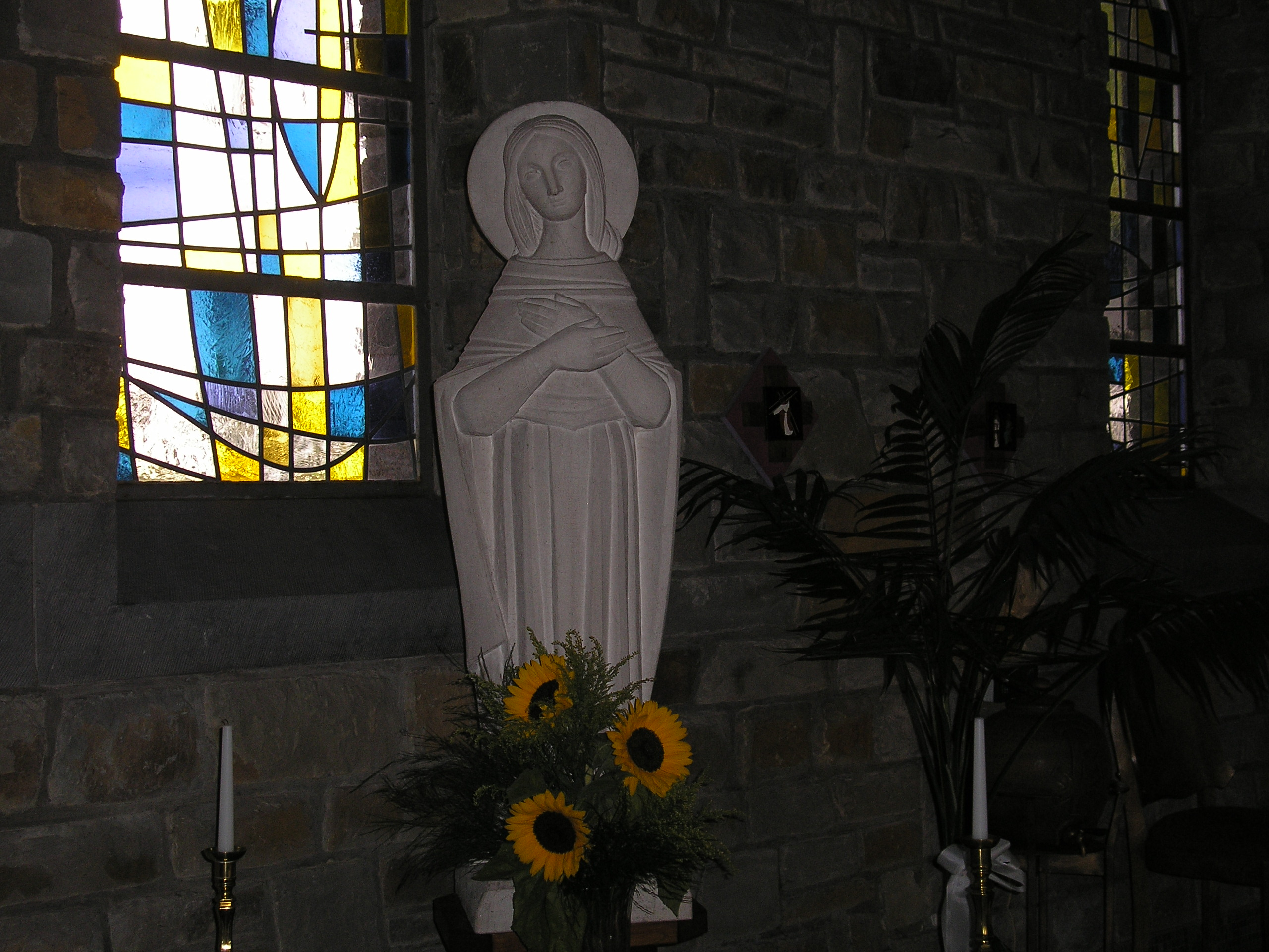 In der Kirche zu Bütgenbach-Berg.